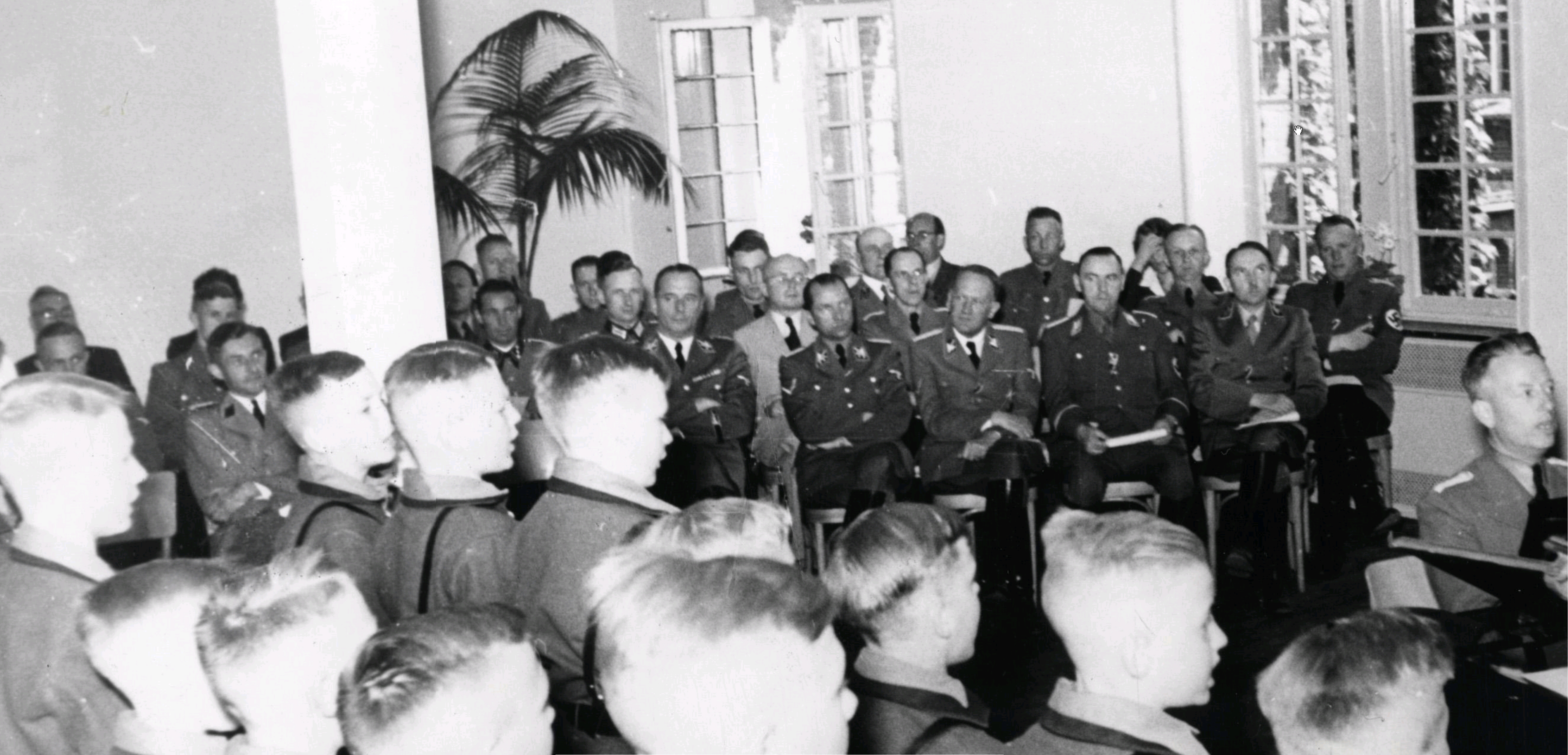 Hanns Albin Rauter, SS-Obergruppenführer in Nederland bezoekt de Reichsschule voor jongens in Valkenburg samen met SS- Obergruppenführer Heiszmeyer (August Heißmeyer) en SS-Brigadeführer Friedrich Wimmer. Op de voorgrond zingende jongens in uniform. Nederland, Valkenburg, 6 juli 1943.